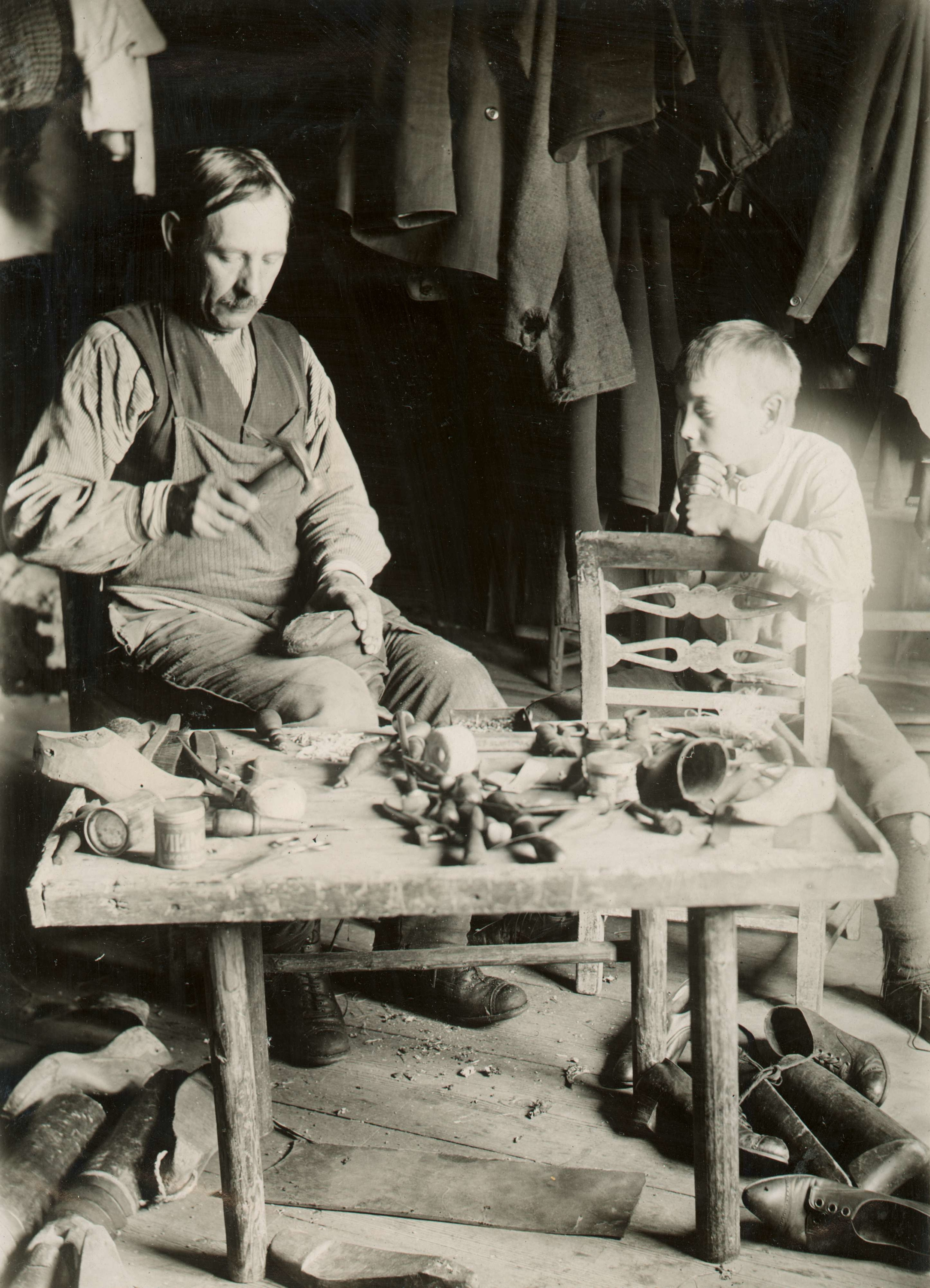 Skomakeri. Skopliggning.